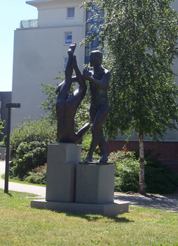 Weststadt Das Paar